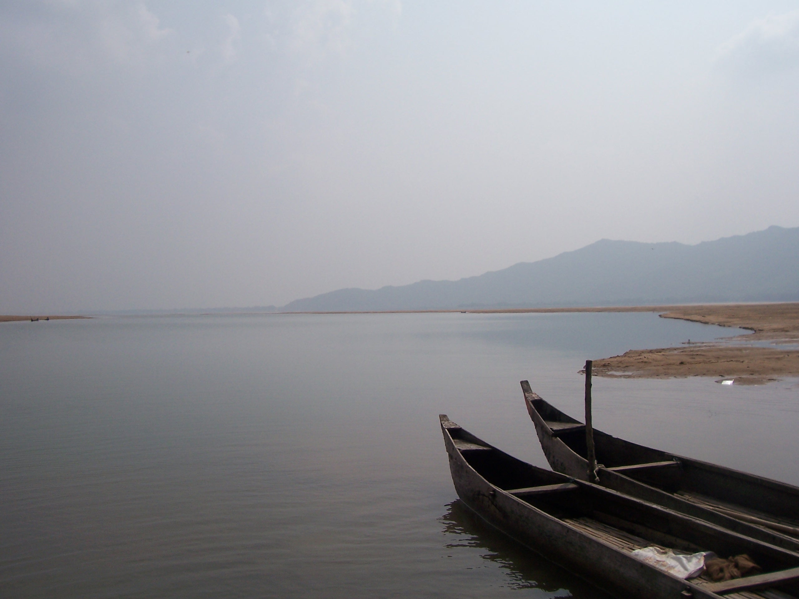 Mahanadi River,Cuttack,Orissa